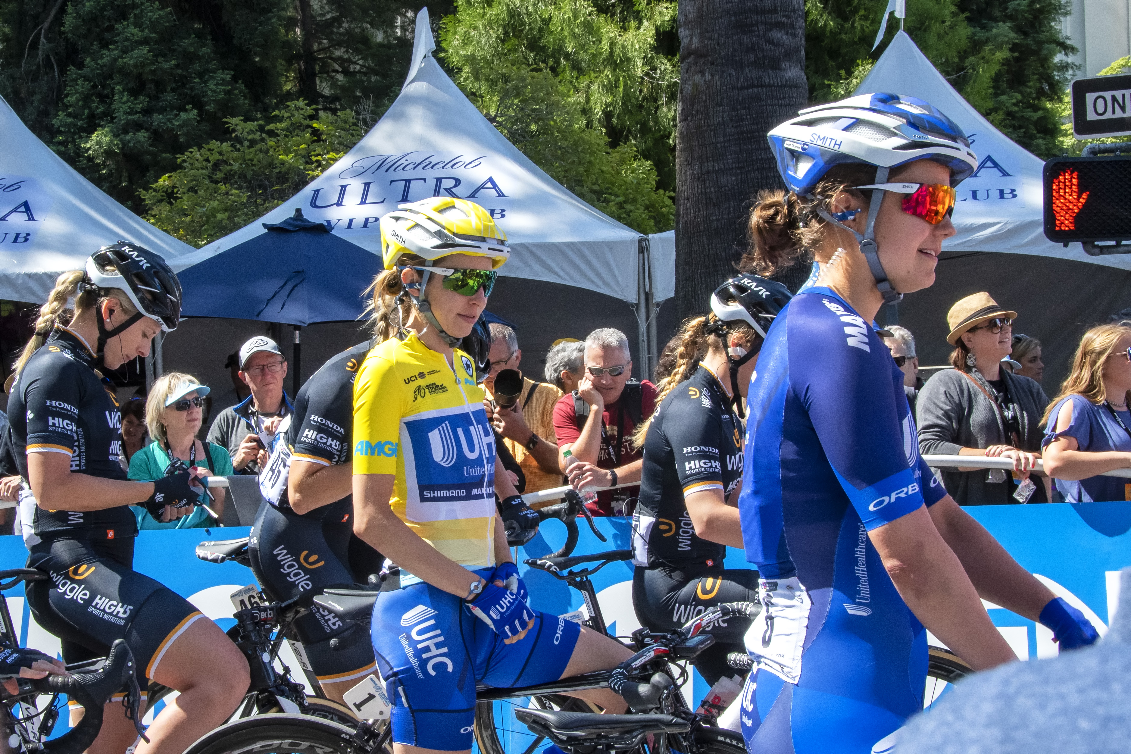 Amgen Women's Tour 2018